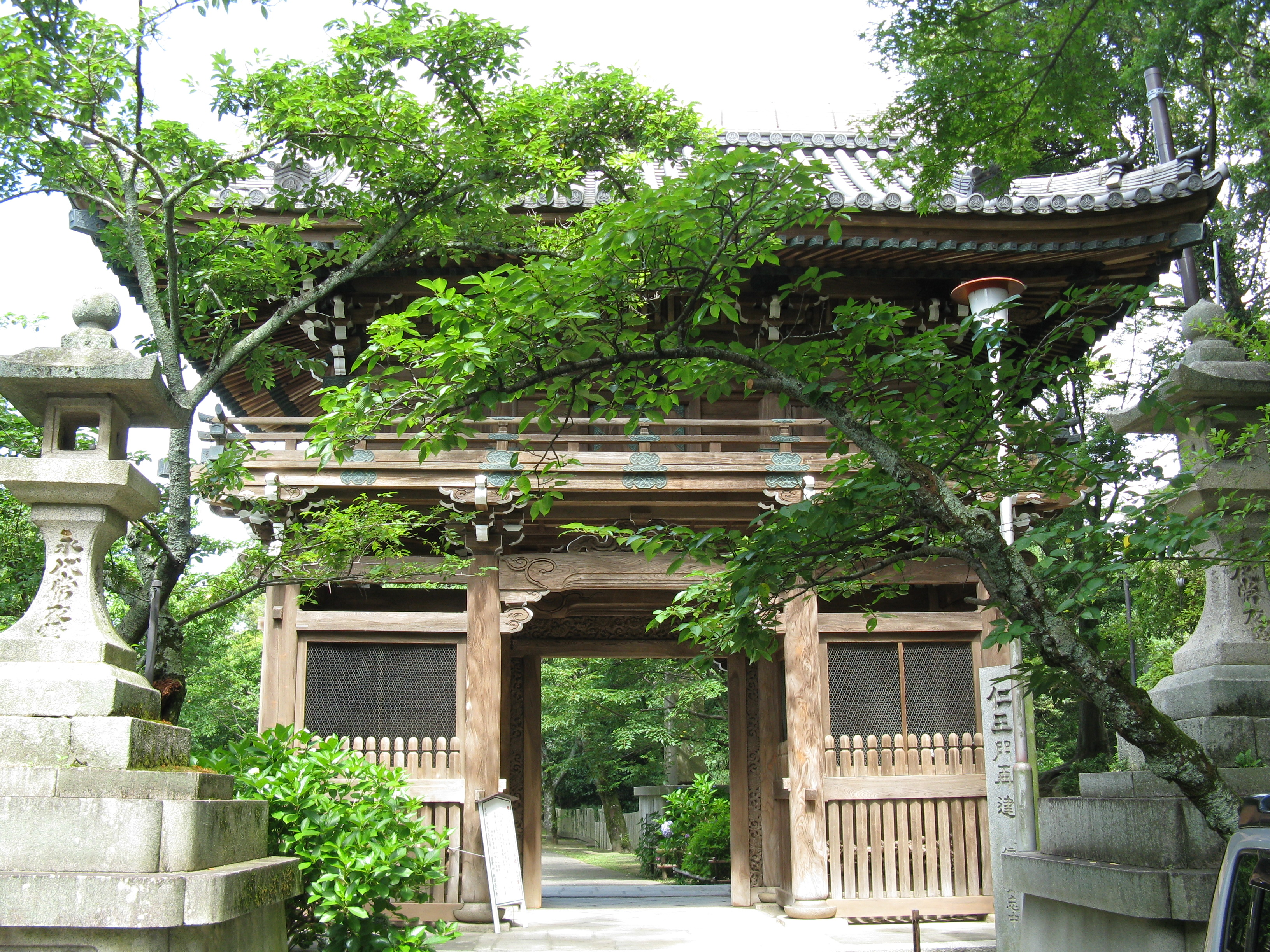 朝護孫子寺 仁王門